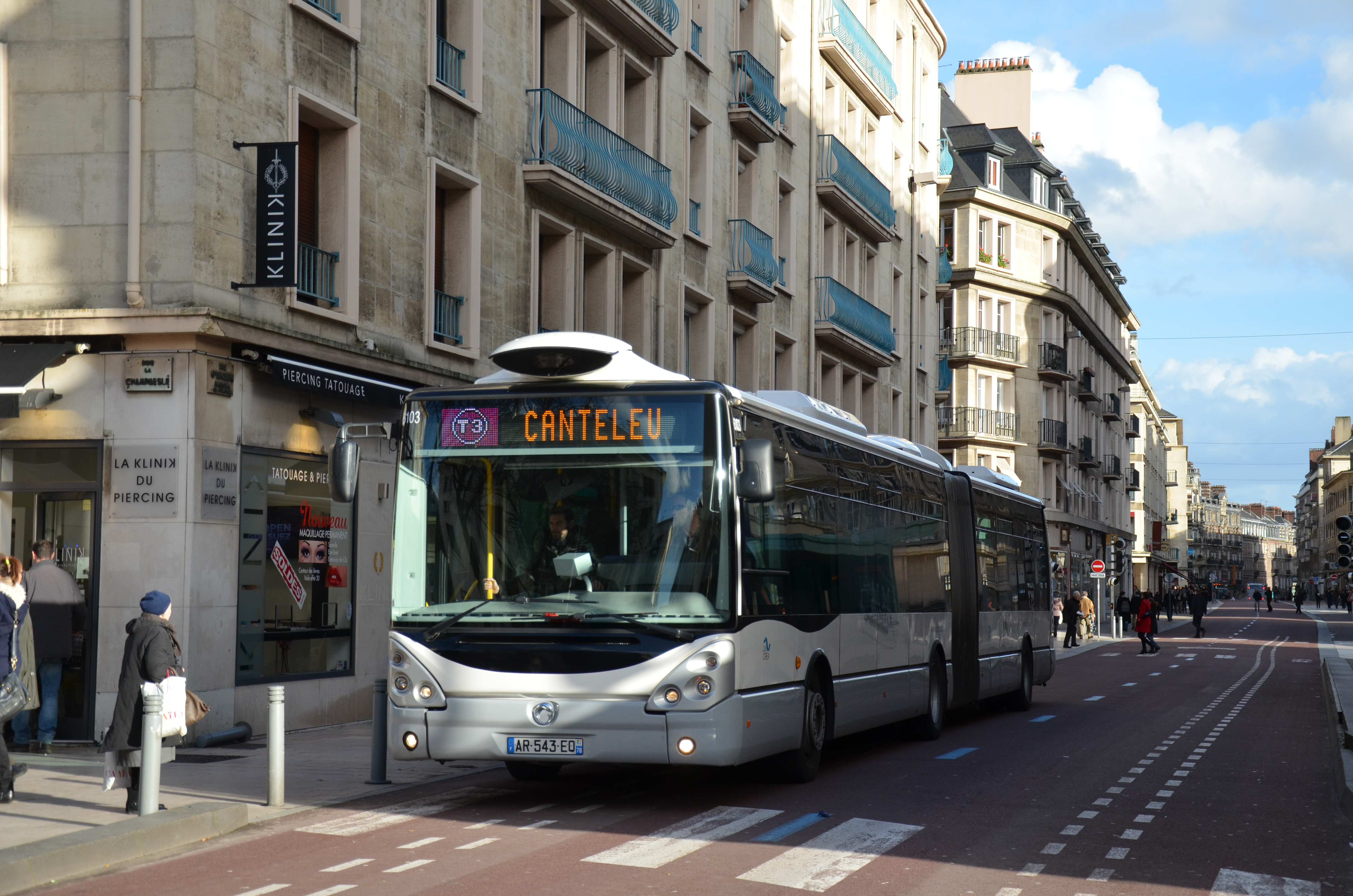 Irisbus Citelis 18 n°6103 près de l'arrêt Cathédrale sur la ligne T3 TEOR, du réseau ASTUCE de Rouen.